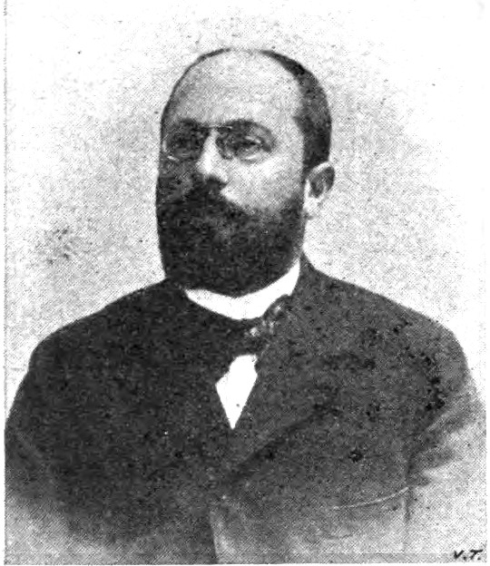 Italo Ghersi